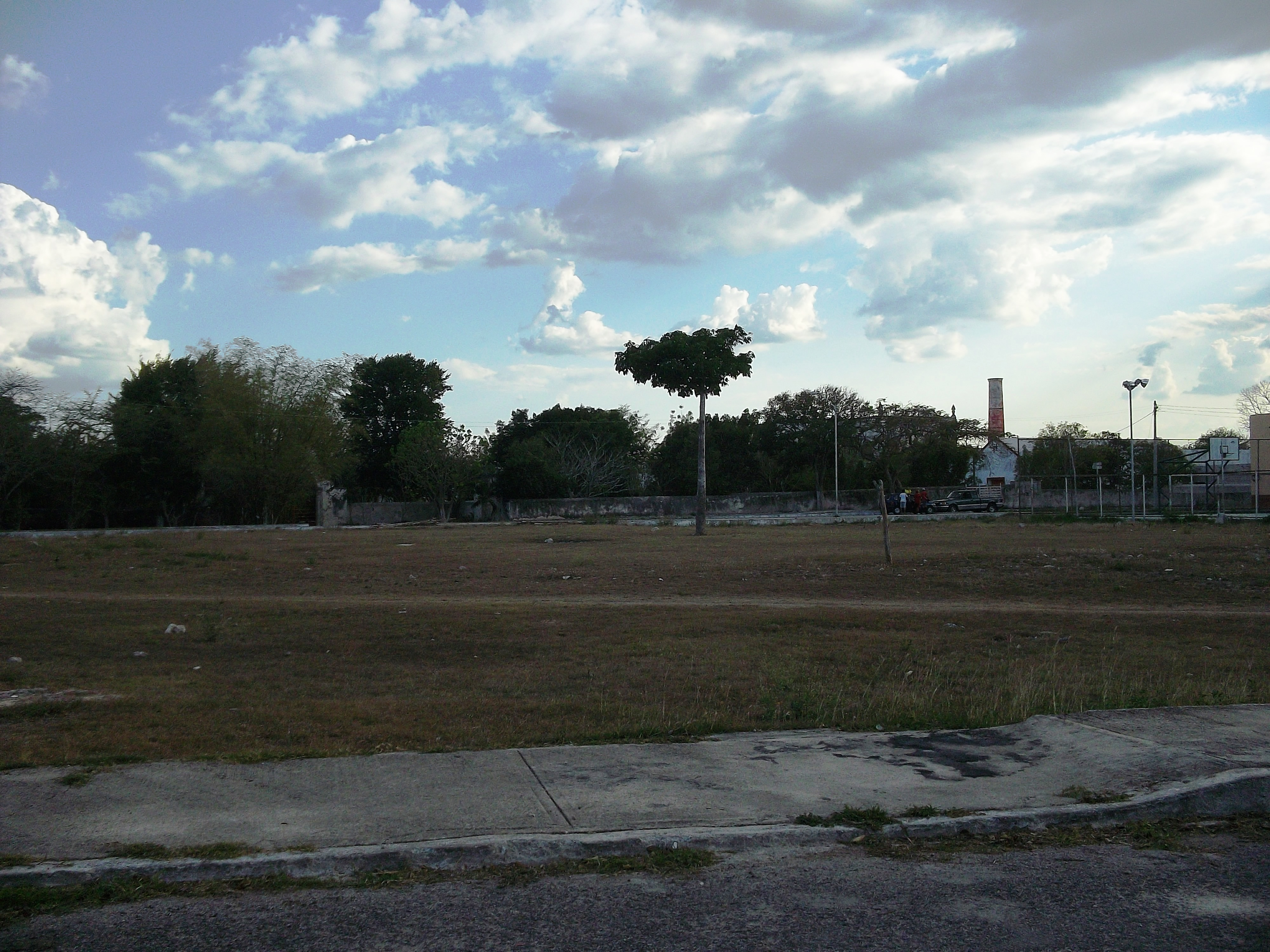 Chalmuch, Yucatán.